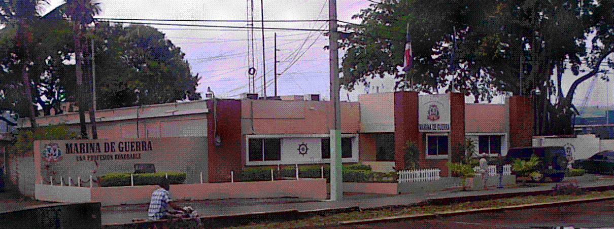 Comandancia de puertomarina de guerra puerto plata